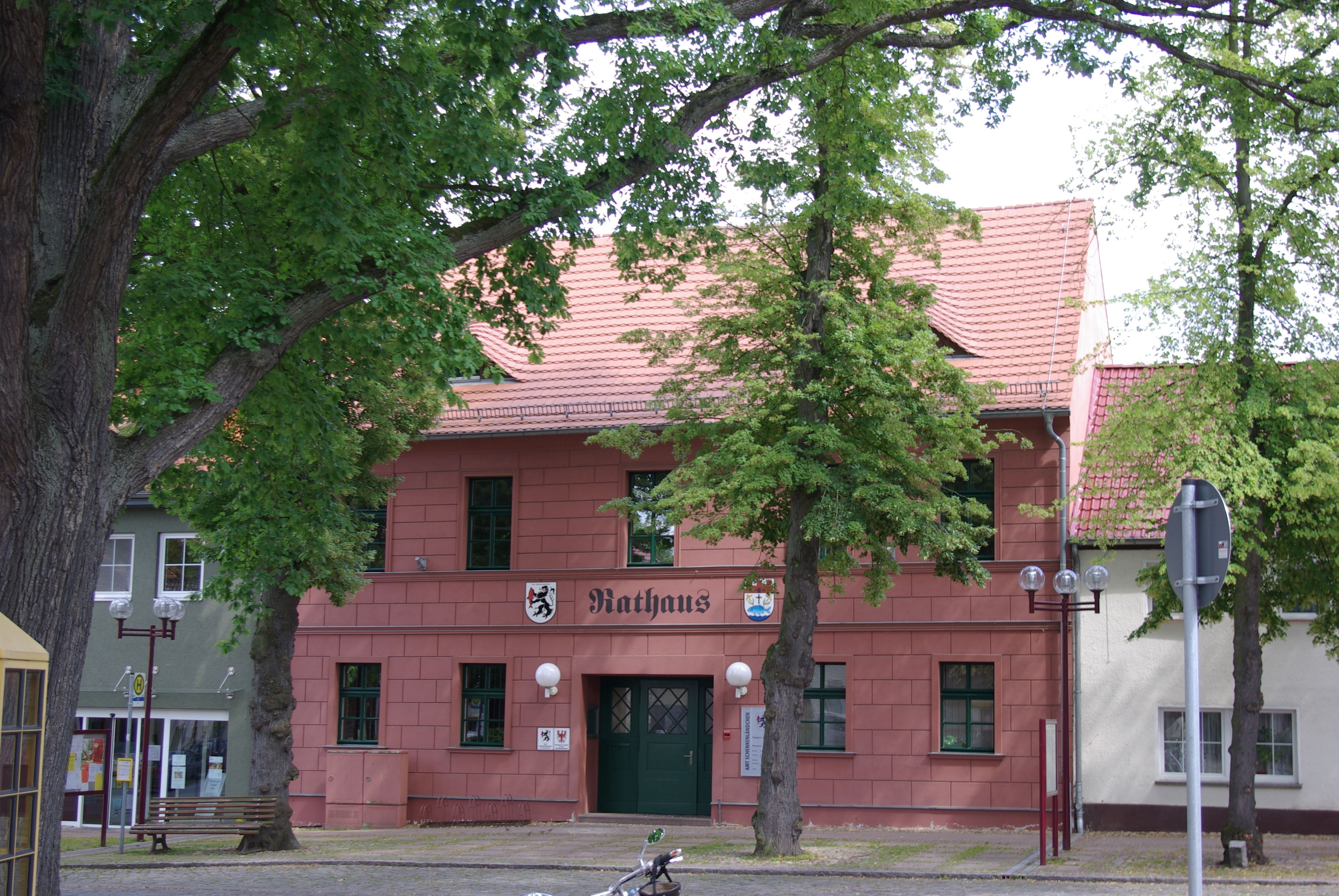 Rathaus der Stadt Teupitz in Brandenburg, Sitz des Amtes Schenkenländchen.